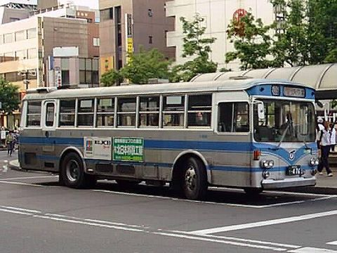 Iwateken Kotsu Bus Isuzu BU04